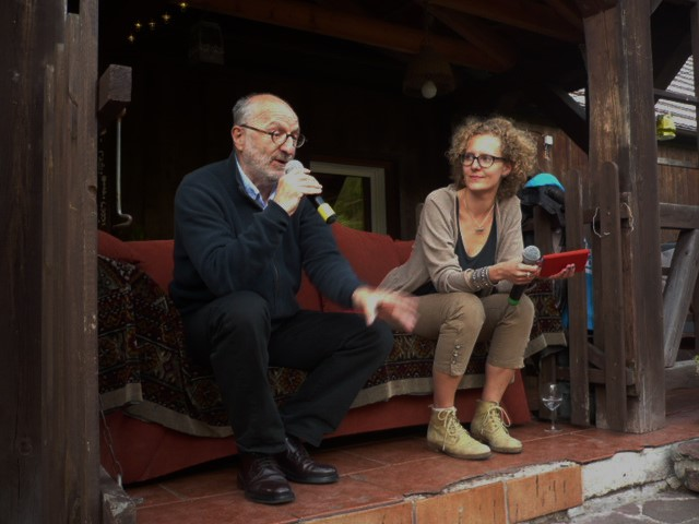 Zbigniew Kruszyński i Justyna Czechowska na Festiwalu Góry Literatury w Krajanowie